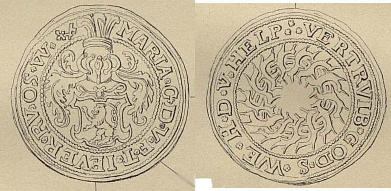 Image of Dornenkranztaler - coin of Maria of Jever 1561 or 1562. Image taken from a book printed at 1887 in Wiesbaden